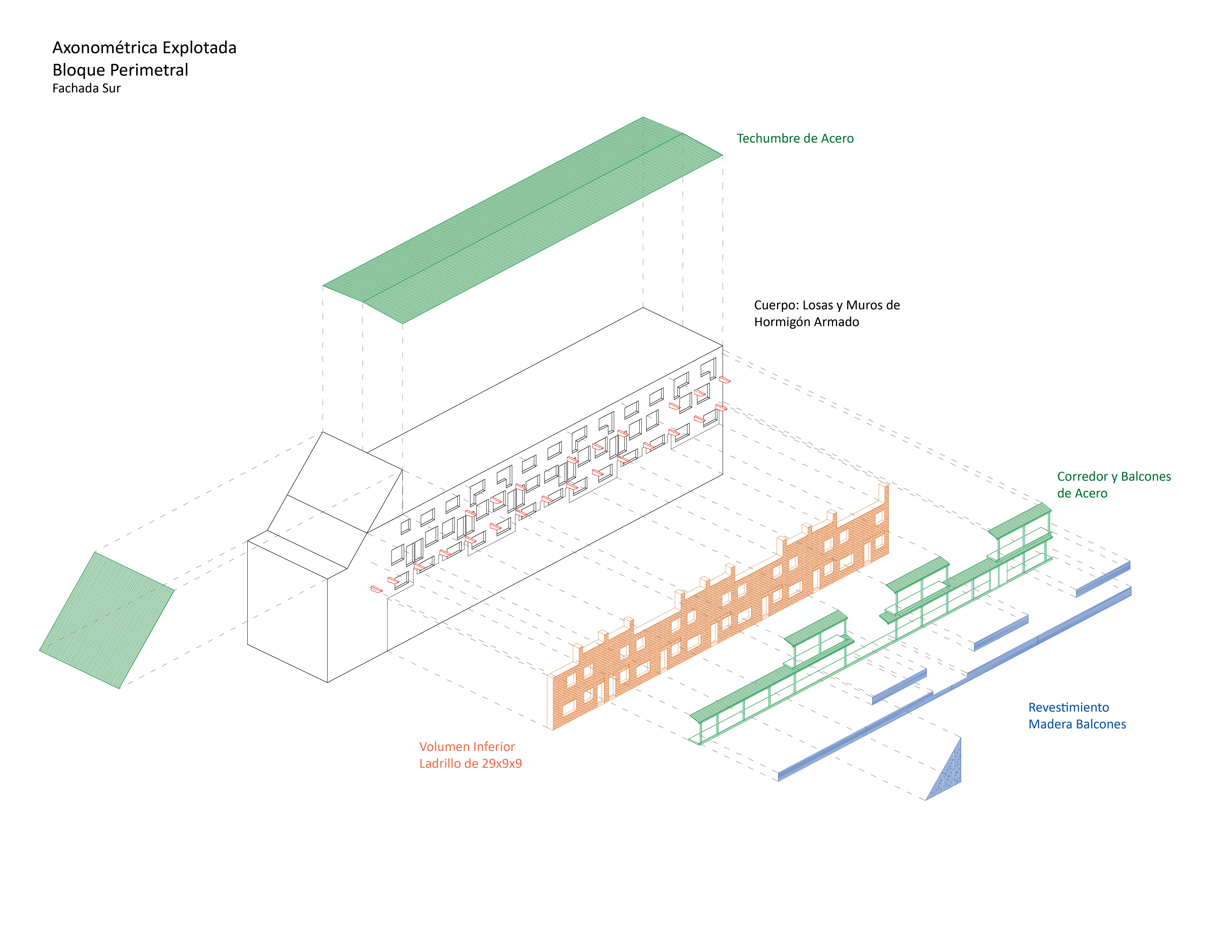 Axonométrica Explotada Muro Perimetral - Colores